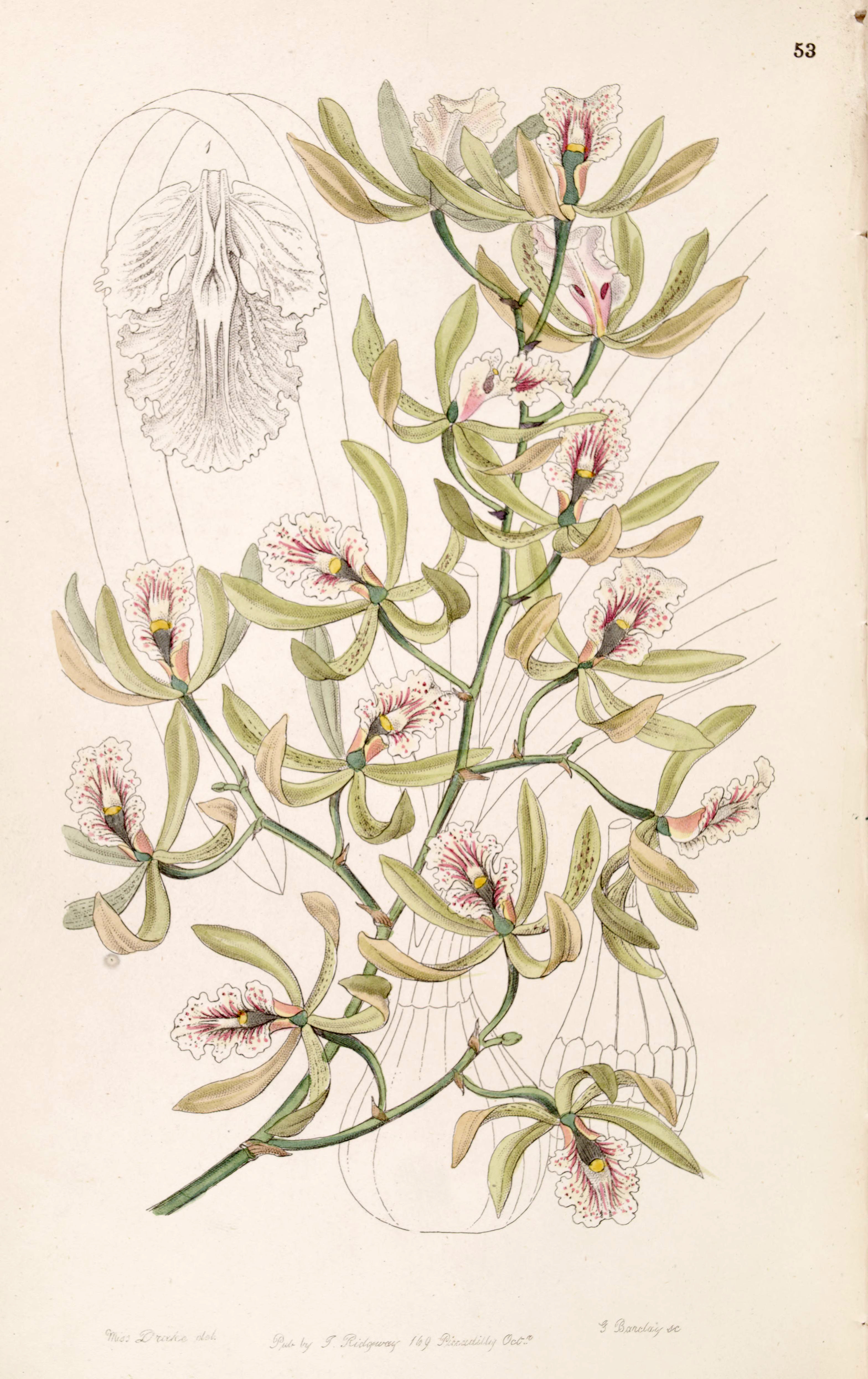 Encyclia ambigua (as syn. Epidendrum alatum)